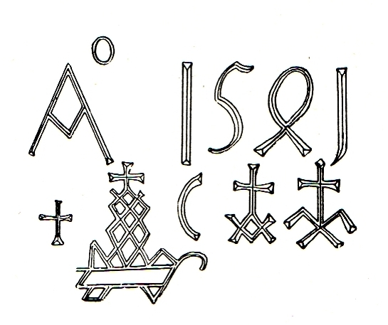 Evangelische Kirche (Borgholzhausen)